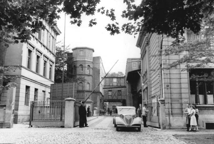 Quedlinburg, Meßgerätewerk Das Meßgerätewerk Quedlinburg jetzt volkseigen. Das Meßgerätewerk Quedlinburg, das im April 1946 in sowjetise Verwaltung übergegangen war, ist jetzt volkseigen geworden. Dieses Werk, das während des Krieges Meßgeräte für Kriegsschiffe und Bombenflugzeuge hergestellt hat, wurde unter der sowjetischen Leitung vollkommen auf Friedensproduktion umgestellt und ist heute mit 800 Belegschaftsmitgliedern einer der bedeutendsten Exportbetriebe der DDR. Zur Zeit werden hier Meß- und Regelgeräte für den Export nach der Tschechoslowakei, Belgien, Dänemark, Polen und Ungarn hergstellt. UBz: Der Eingang des Werkes. Aufn.: Illus Biscan Be. 7207-50 1 13.7.50 ILLUS Berlin W 8